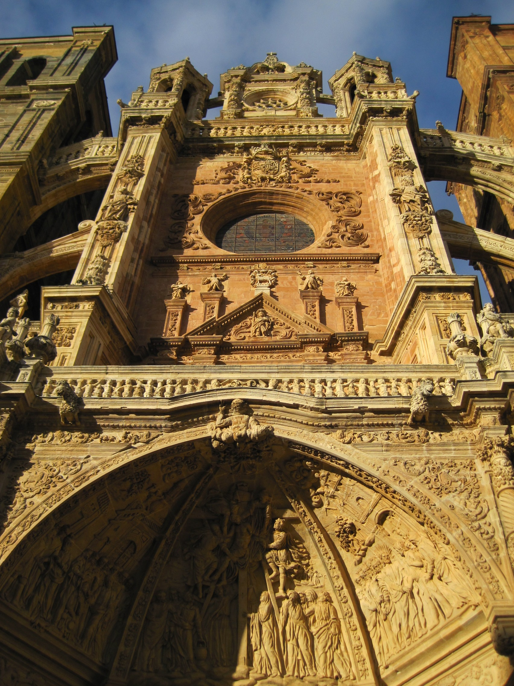 Vista del cuerpo central de la fachada de la catedral de Astorga (León, España).